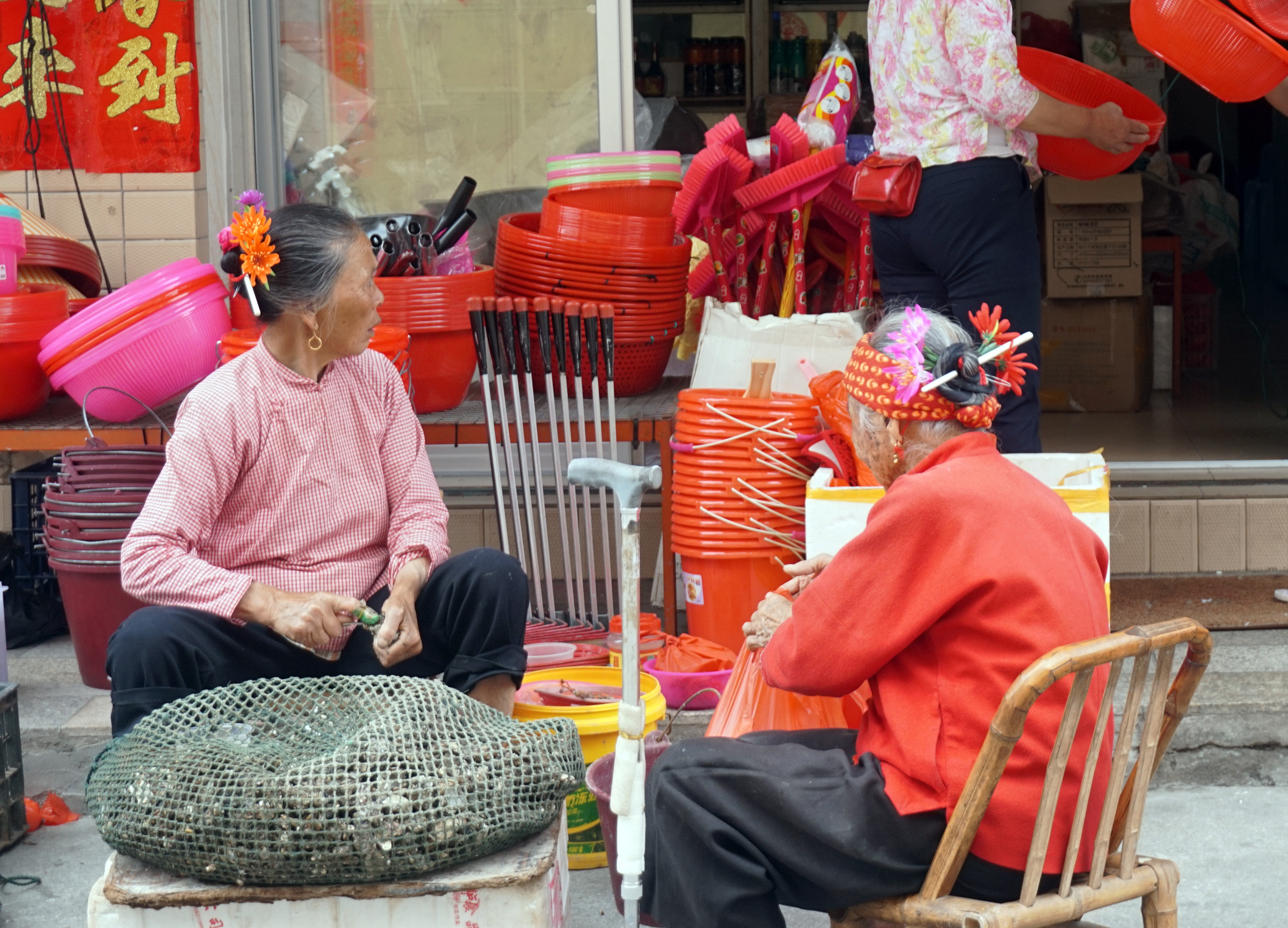 老年蟳埔女的红头巾。 Personality rights warning Although this work is freely licensed or in the public domain, the person(s) shown may have rights that legally restrict certain re-uses unless those depicted consent to such uses. In these cases, a model release or other evidence of consent could protect you from infringement claims.